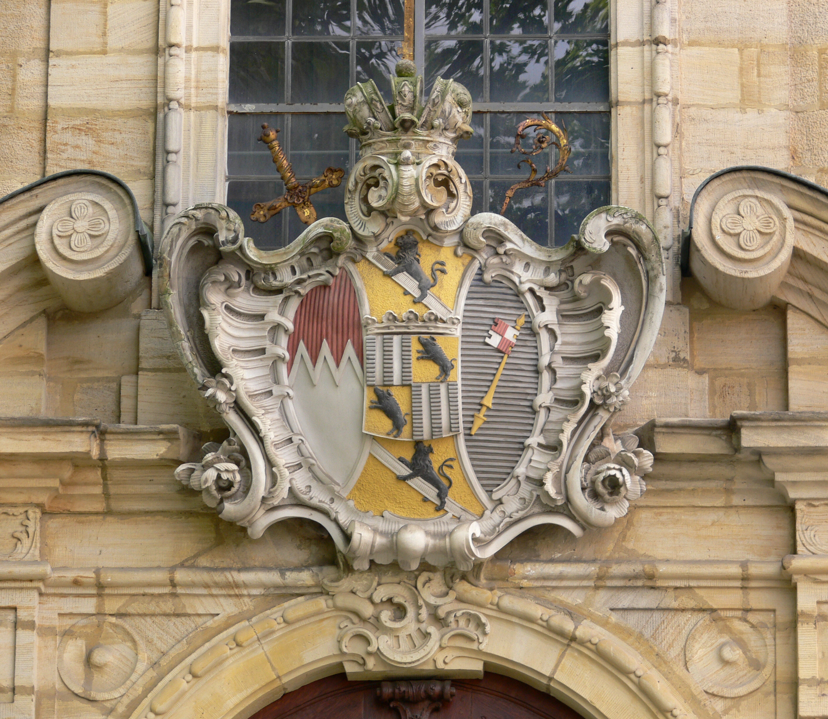 Bamberg, ehem. Stiftskirche St. Jakob Wappen des Bischofs Adam Friedrich von Seinsheim